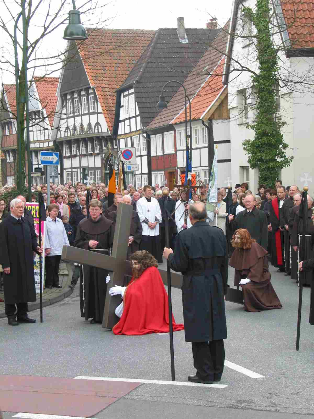 "Karfreitagsprozession Wiedenbrueck: Fall in Hoehe Hotel Wartburg"